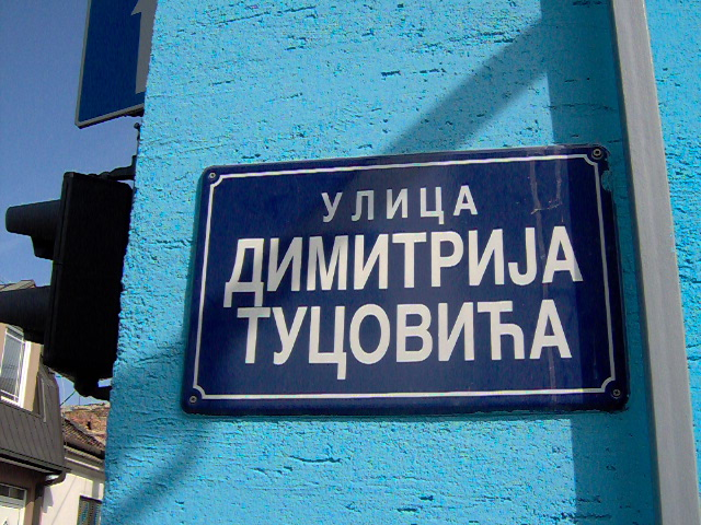 Ulica Dimitrija Tucovića u Beogradu.